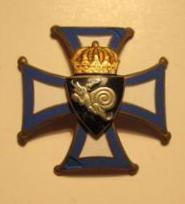 Kõrgeim autasu Tigudraakoni orden